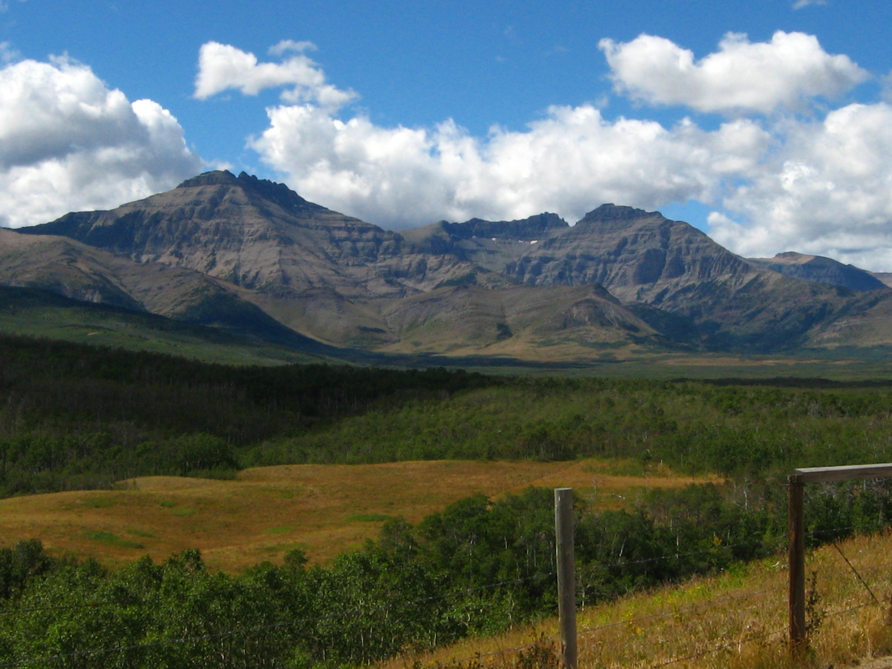 mountains and prairie